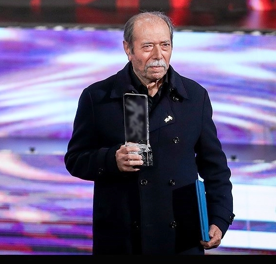 برنده بهترین بازیگر نقش مکمل مرد از جشنواره 37